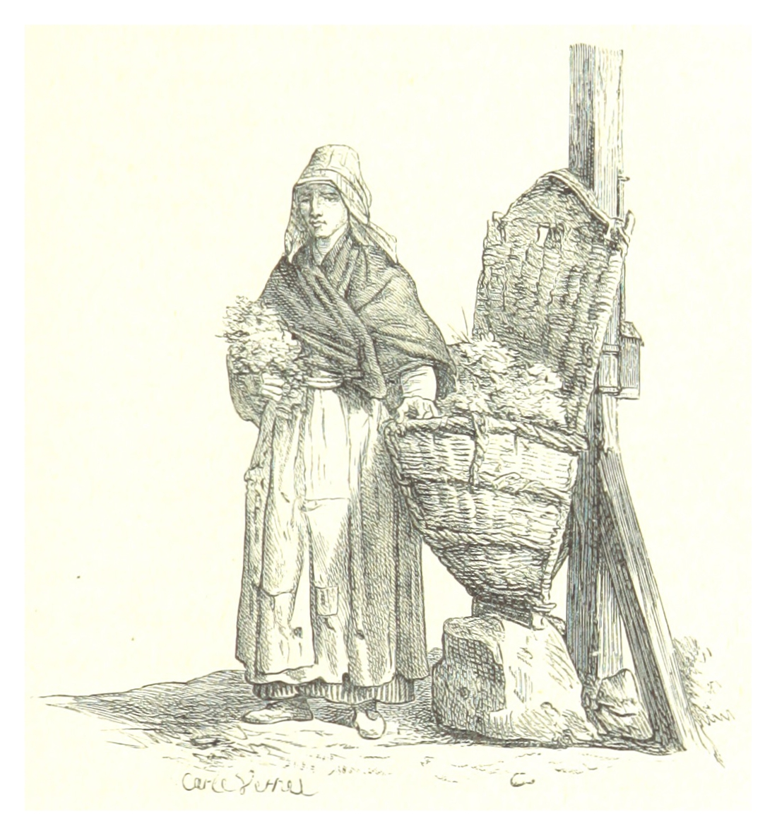 Commerce ambulant; vendeuse de rue ou colportrice avec hotte et mouron.